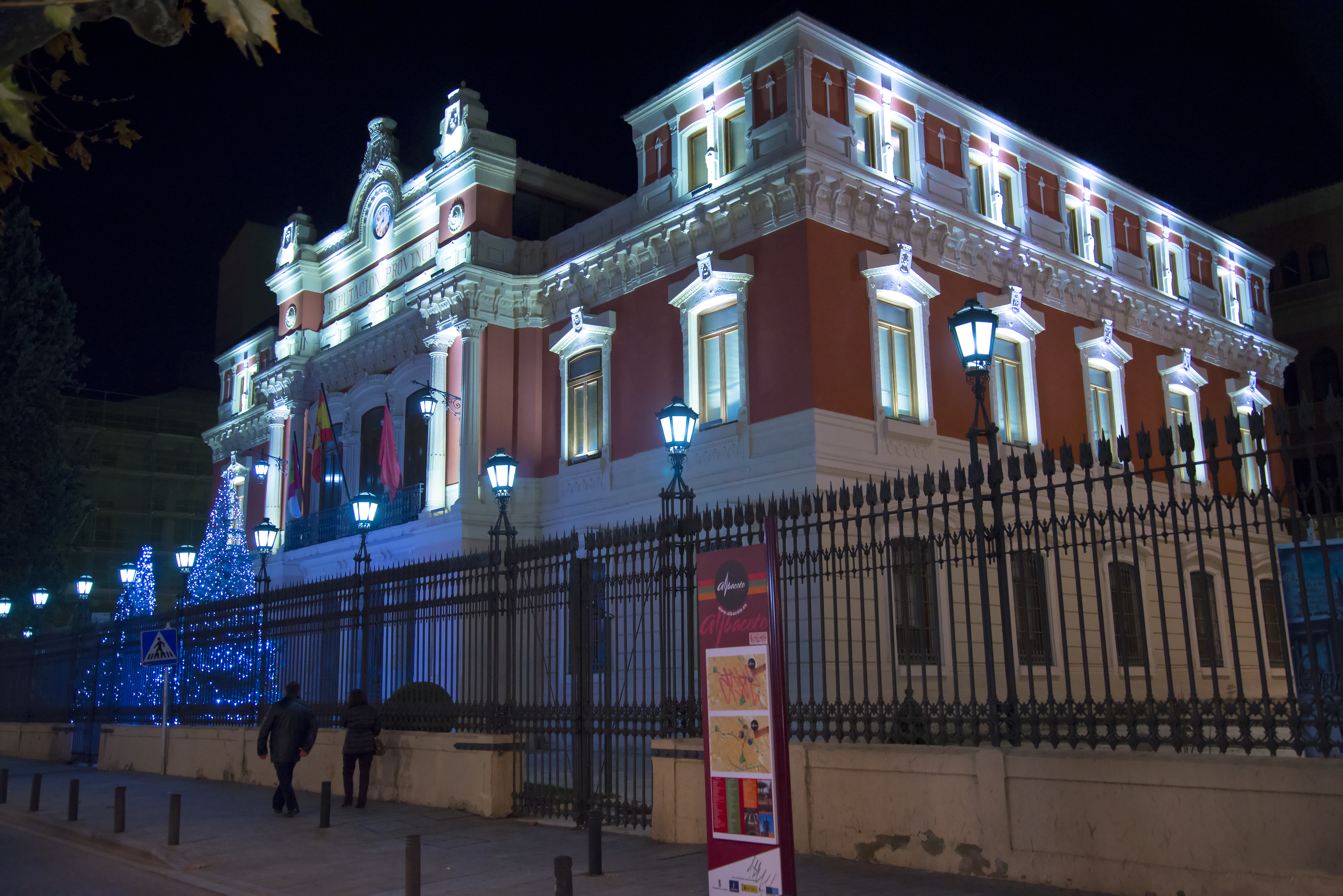 Albacete nocturno